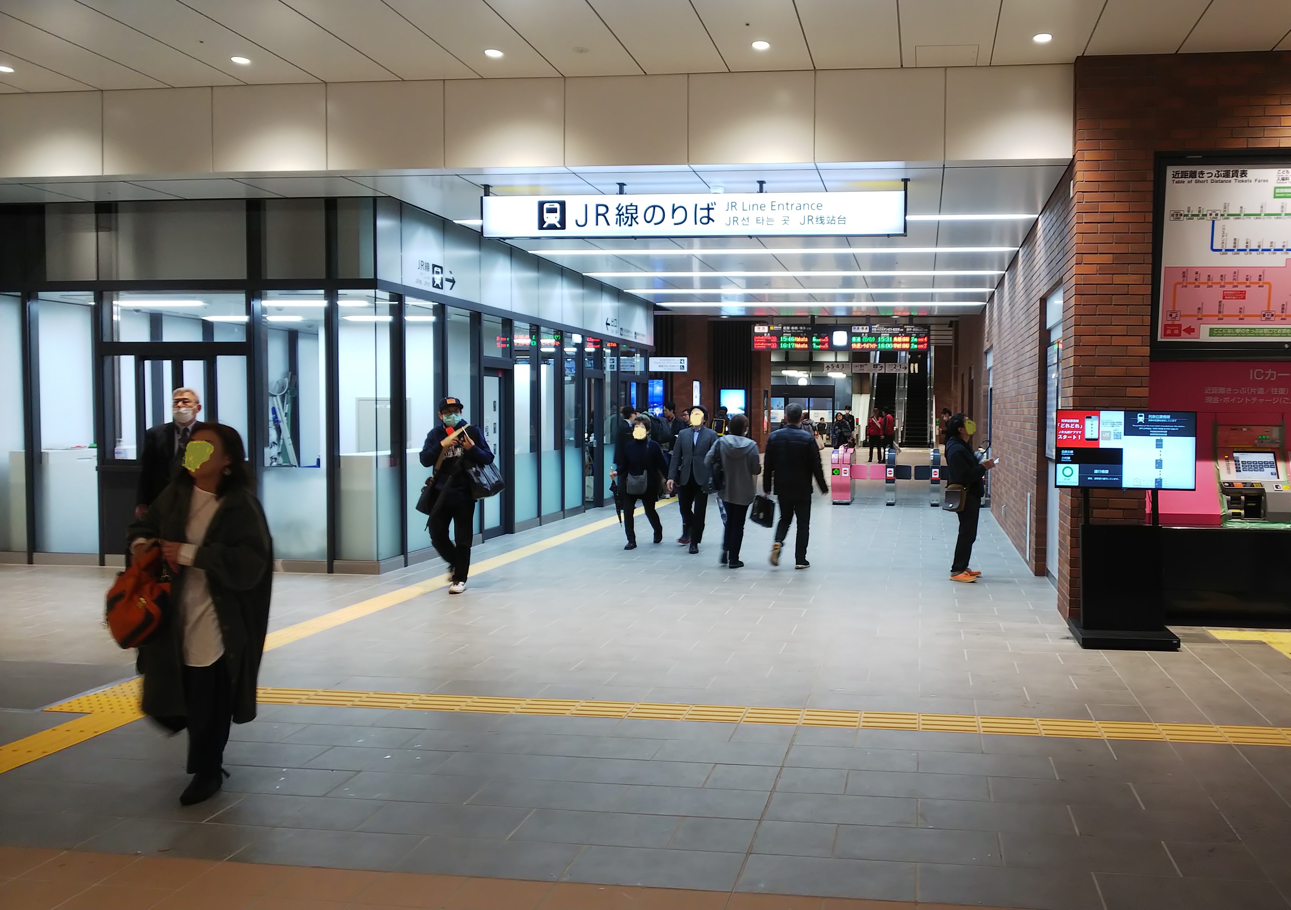 JR長崎駅新改札口